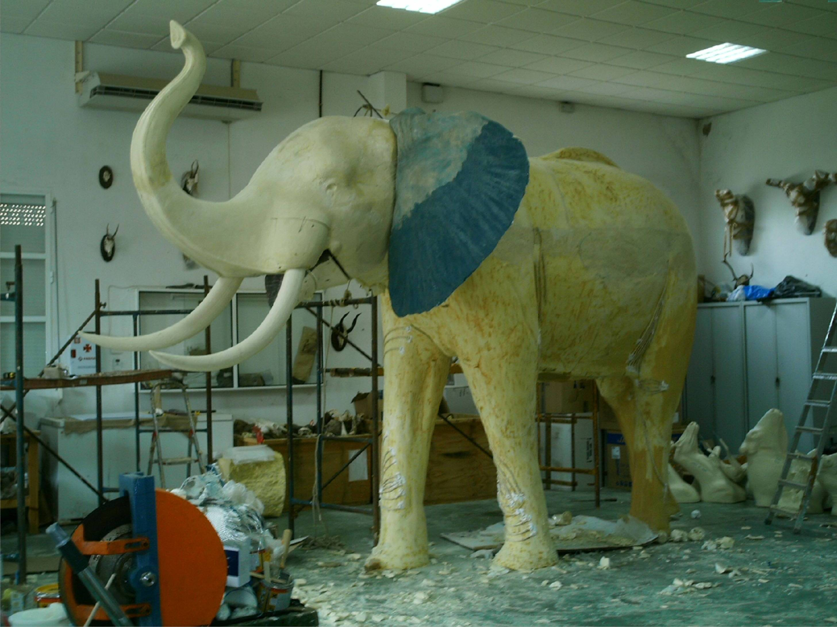 Maniquí de elefante africano macho realizado por Salvatore Rabito